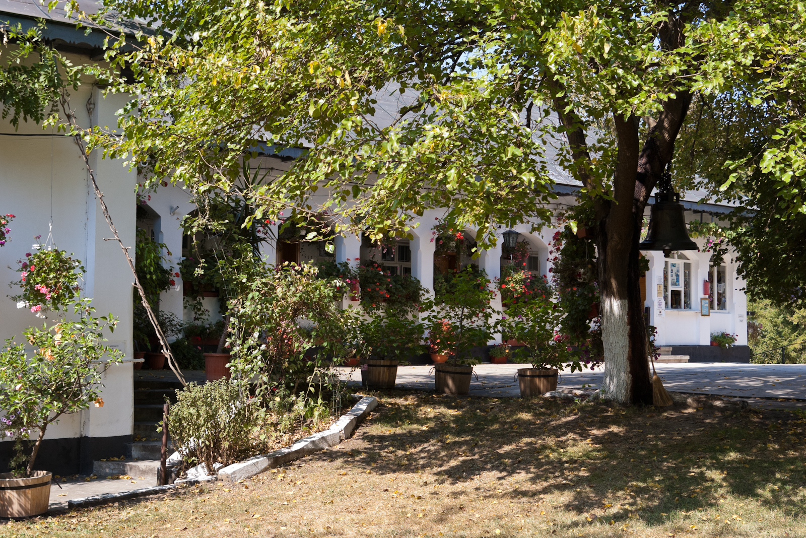 Fotografia prezinta chiliile din incinta Schitului Trivale (str. Trivale nr. 71) 02